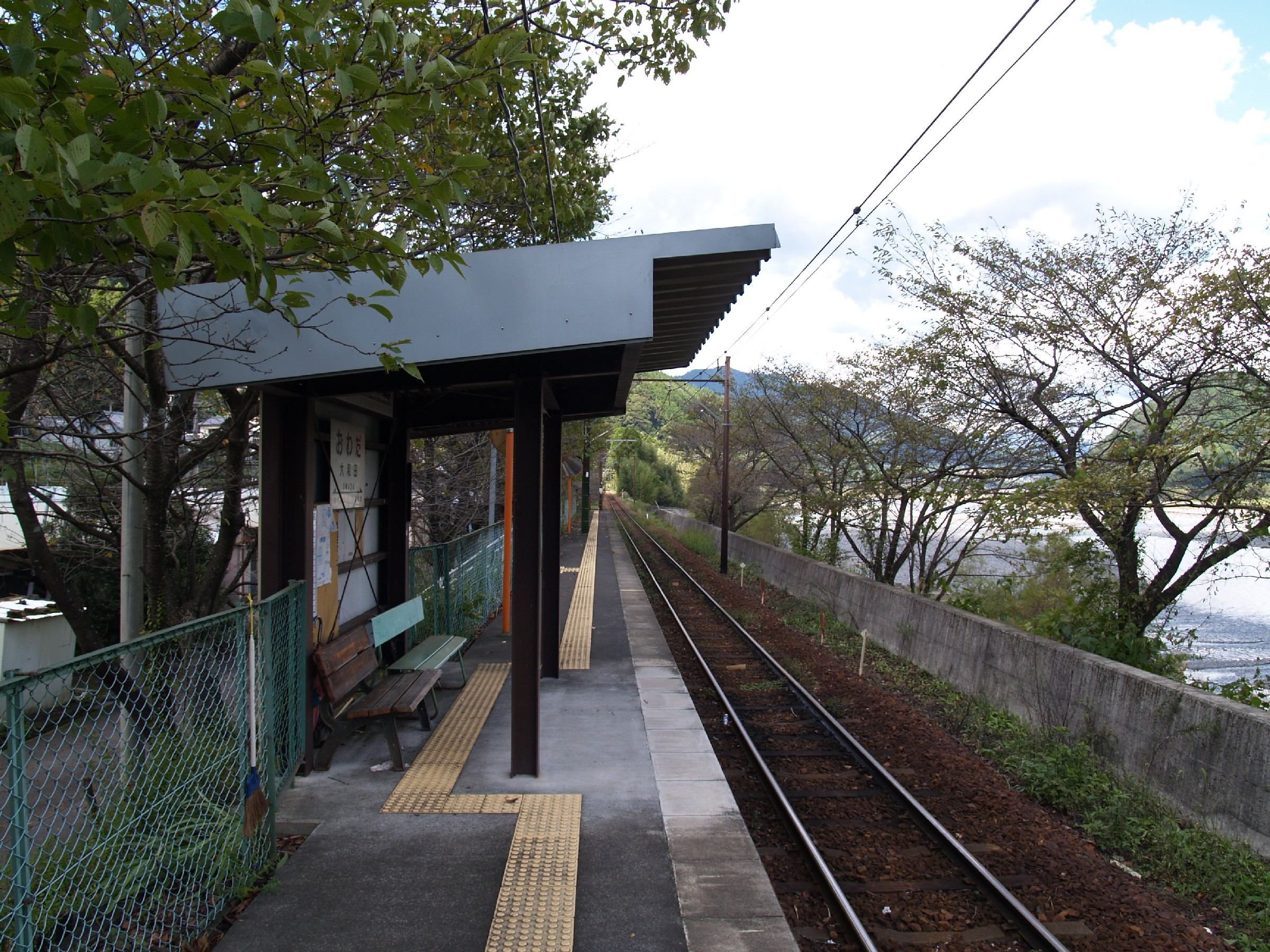 大和田駅